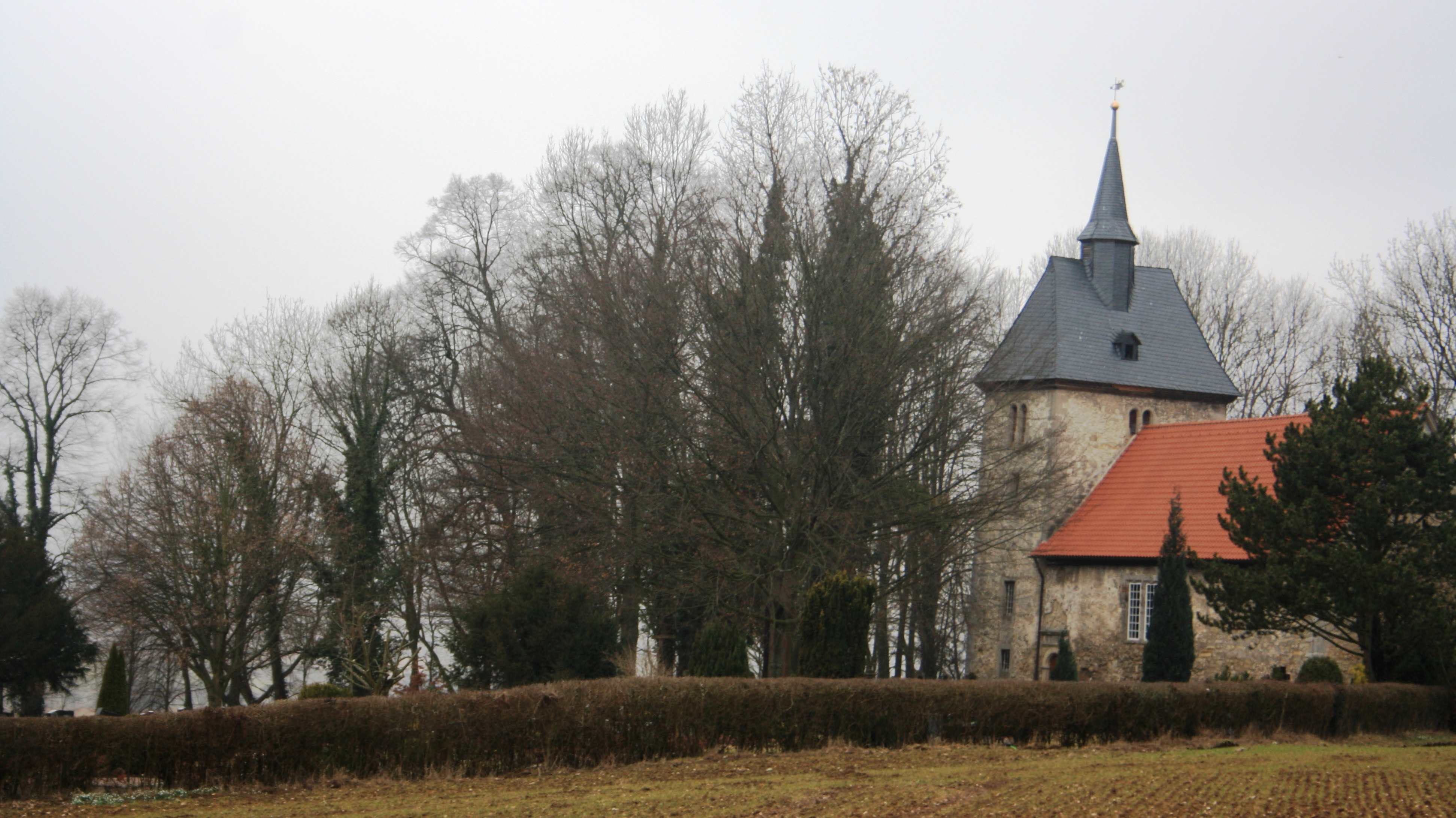 Weissenwasserkirche im Gebiet des Kahlbergs,aus Jahre 1055 .